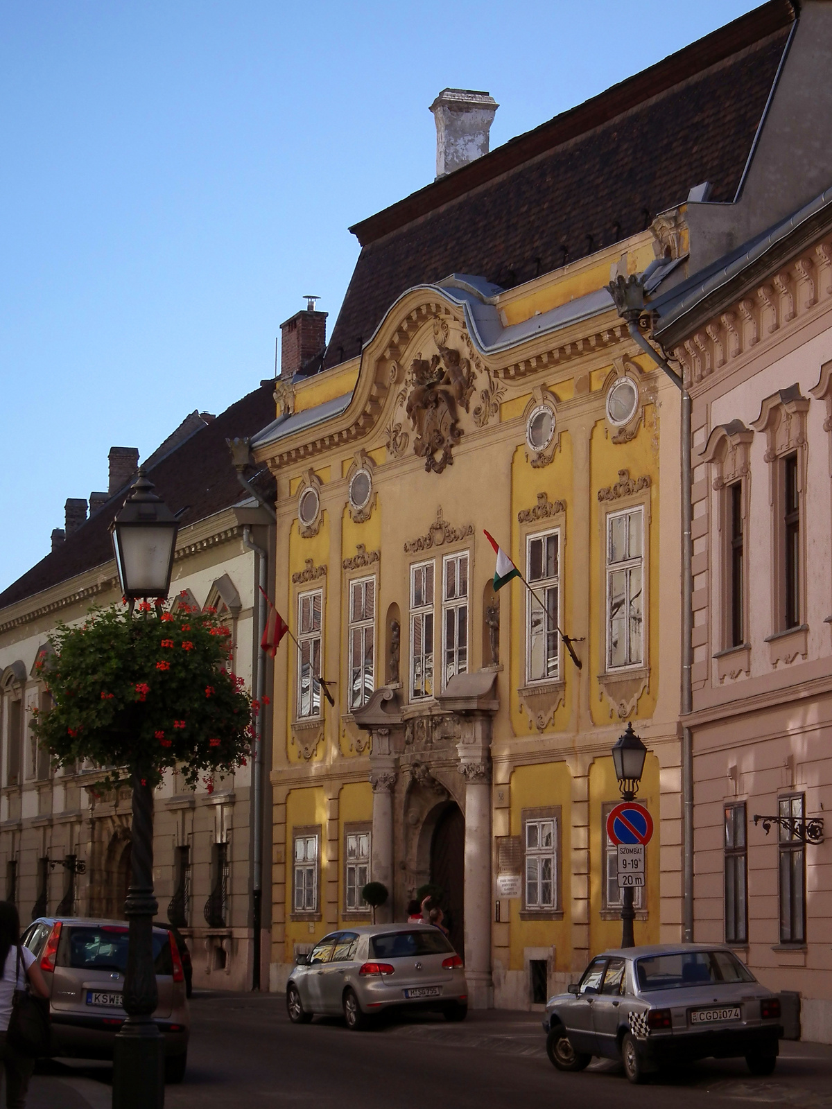 Egyemeletes lakóház (Budapest 1, Úri utca 58., Tóth Árpád sétány 33.) This is a photo of a monument in Hungary. Identifier: 212